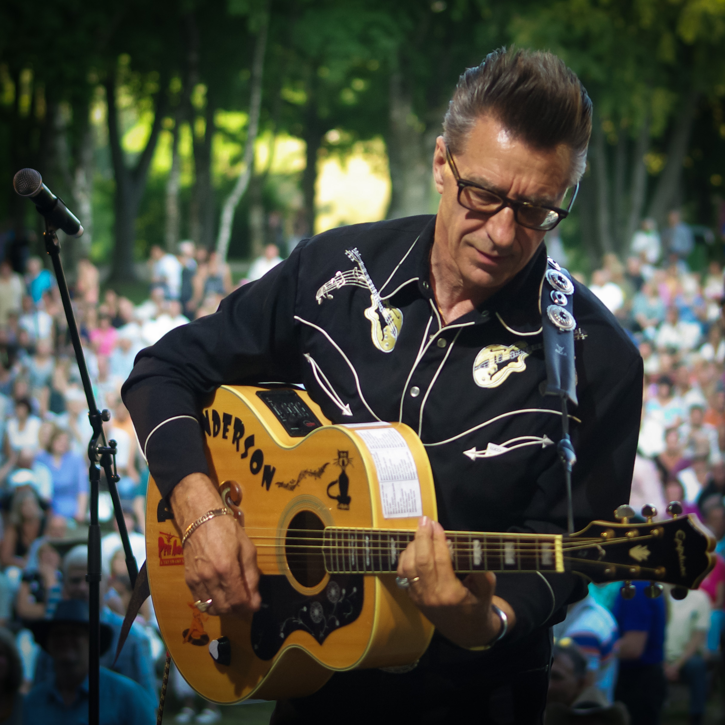 Alfrēds Pēteris Andersons - Pits Andersons